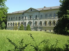 Südseite des Schlosses Aschach an der Donau